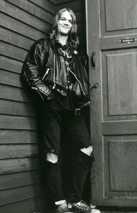 Tomi Koivusaari around '90